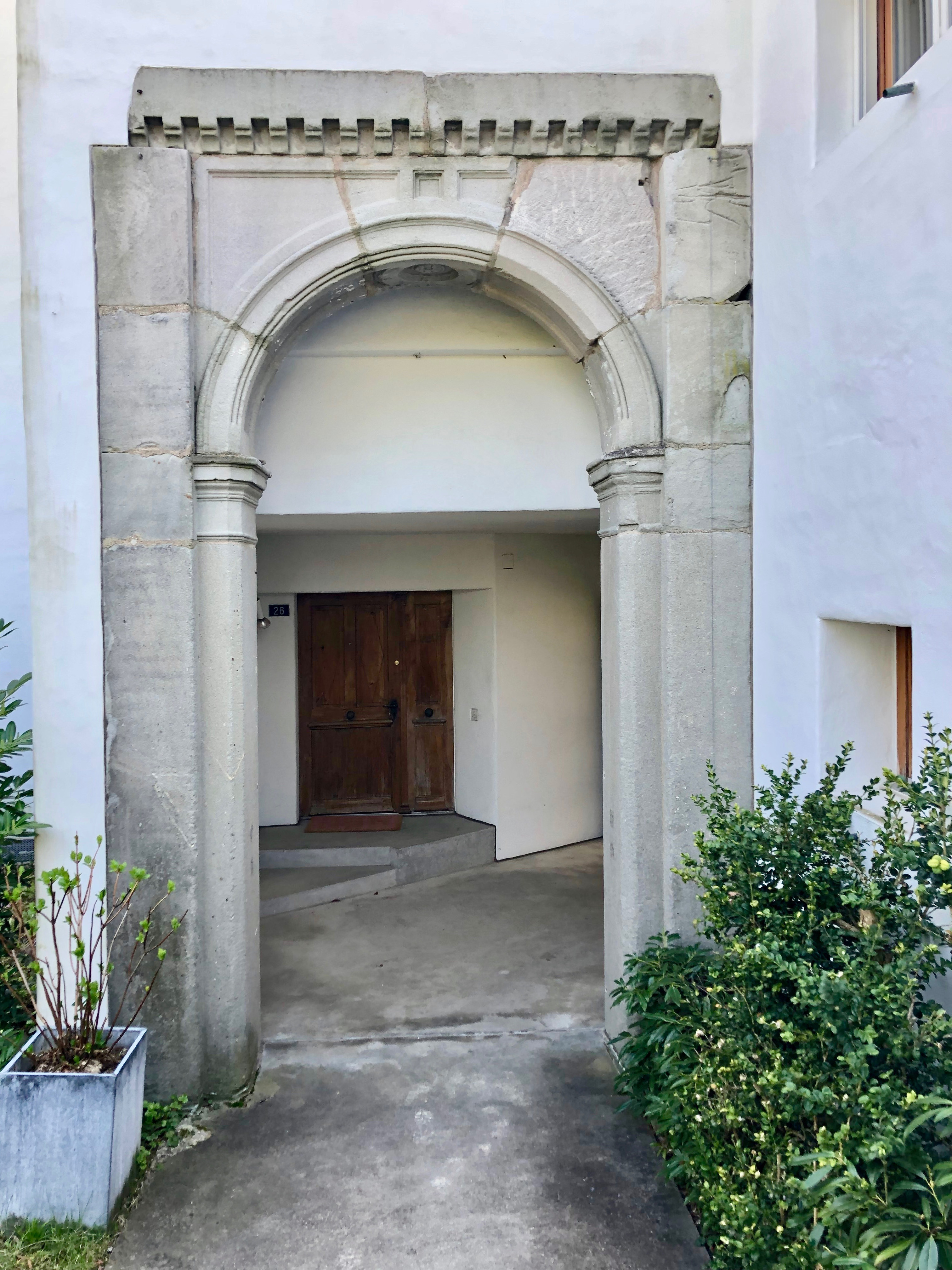 Seldwyla Eingangstor